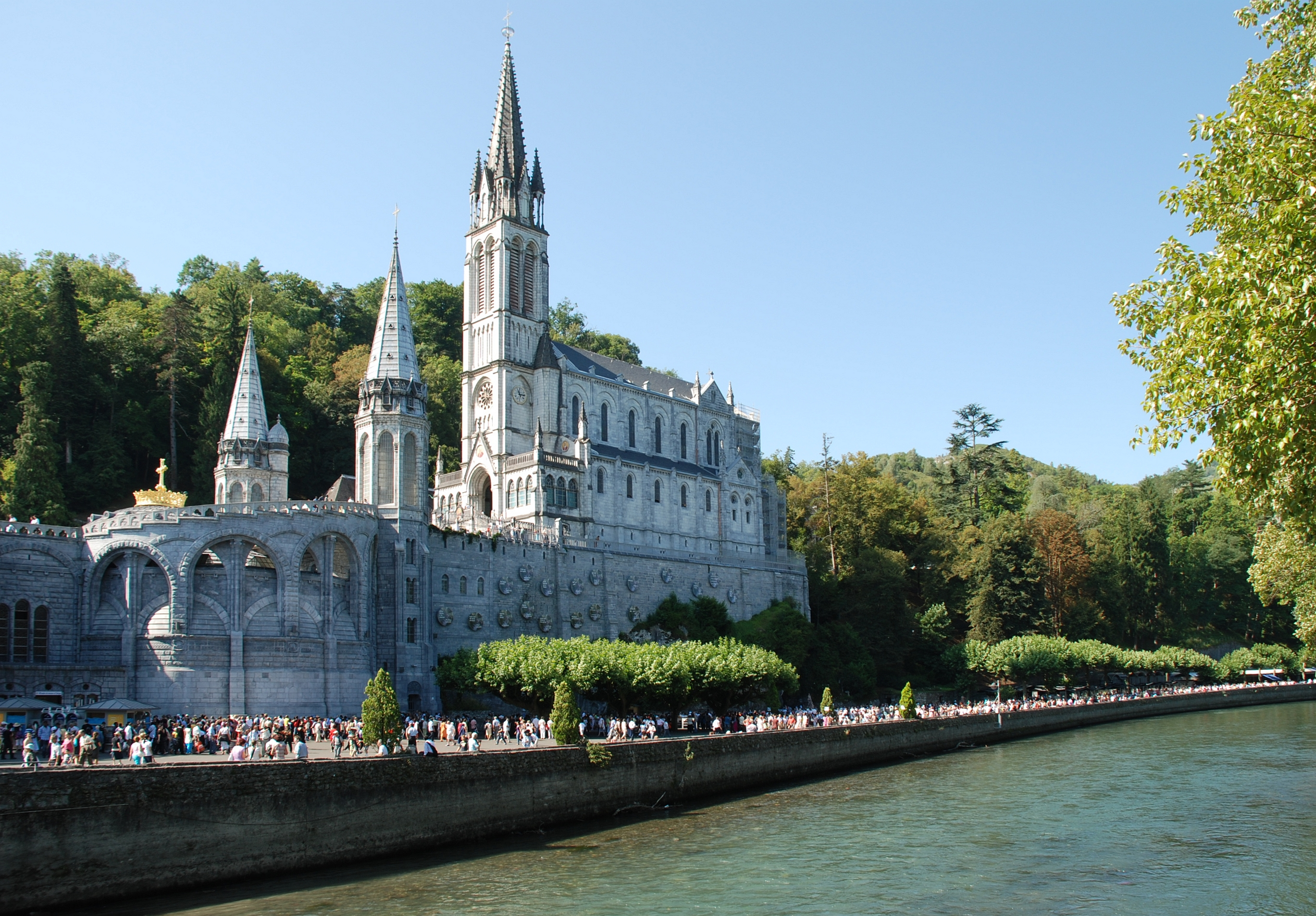 Basilique Notre Dame du Rosaire et Basilique de l'Immaculée Conception au dessus de la Grotte des Apparitions, et Gave de Pau, à Lourdes